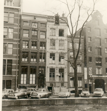 Magazijn en kantoor van Uitgeverij Holland op de bovenste verdiepingen van Herengracht 149 (witte huis) in Amsterdam, maart 1964